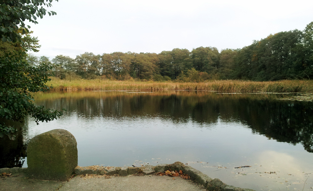 Landwehrteich